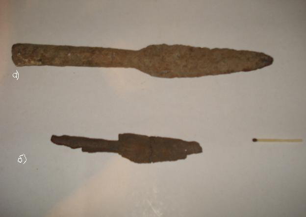 наконечник копья и дрота